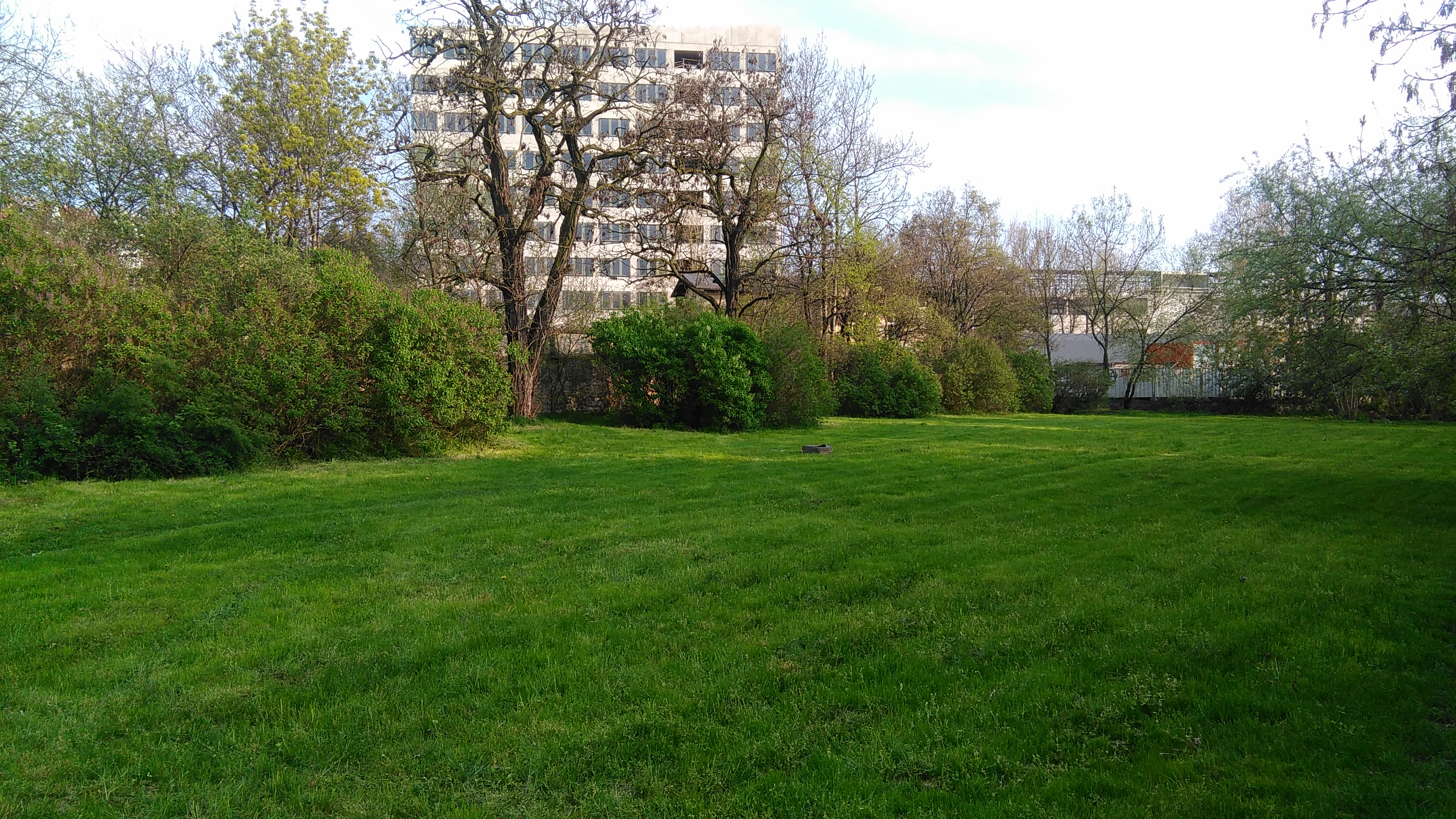 Pod nánosem zeminy se na tomto místě nachází Starý židovský hřbitov v Libni